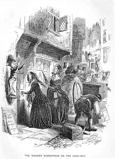 Dombey and Son, l'enseigne de la boutique, L'Aspirant de Bois, comme une figure de proue après le départ de Walter (chapitre 19)